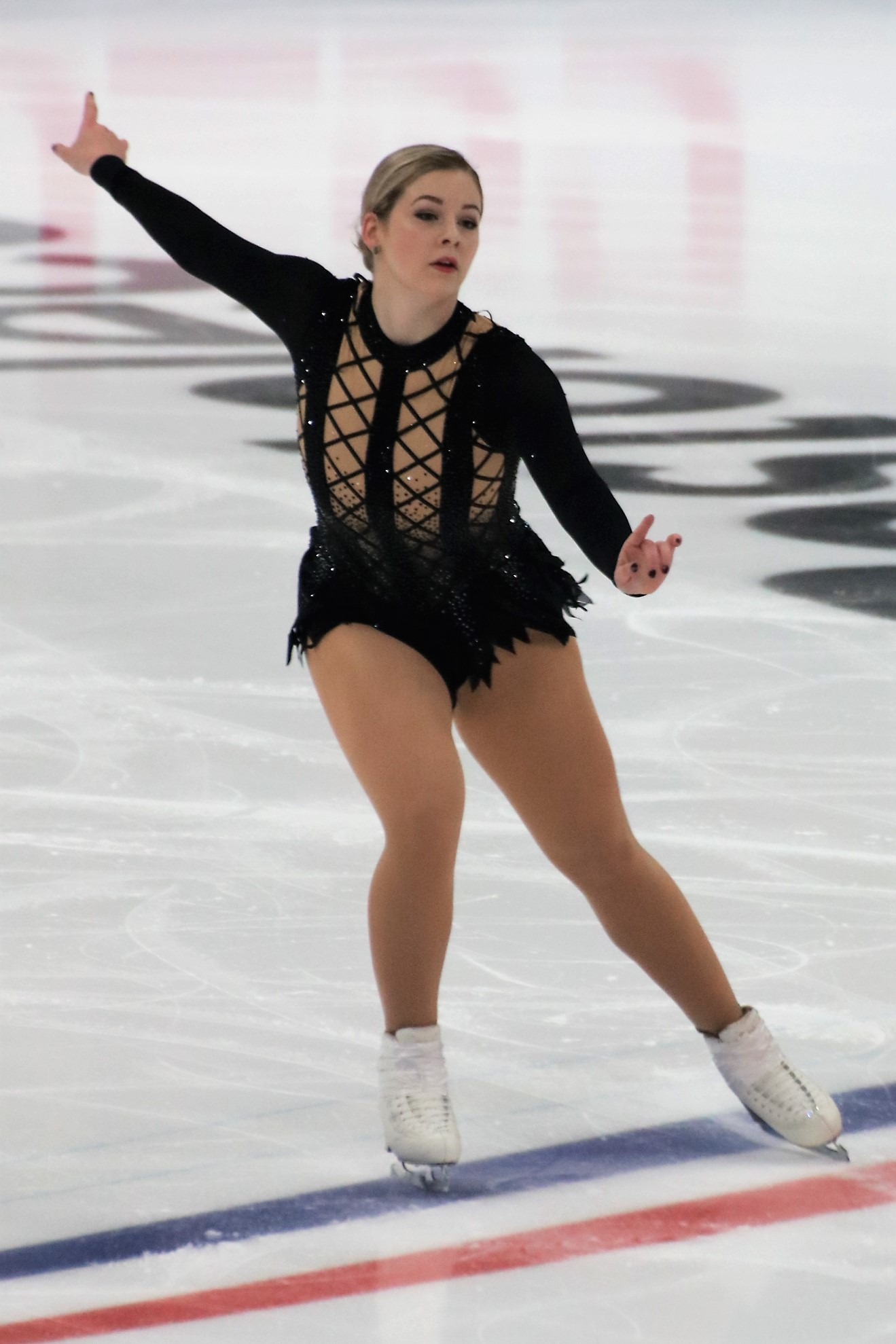 Грейси Голд (США) на Rostelecom Cup 2018